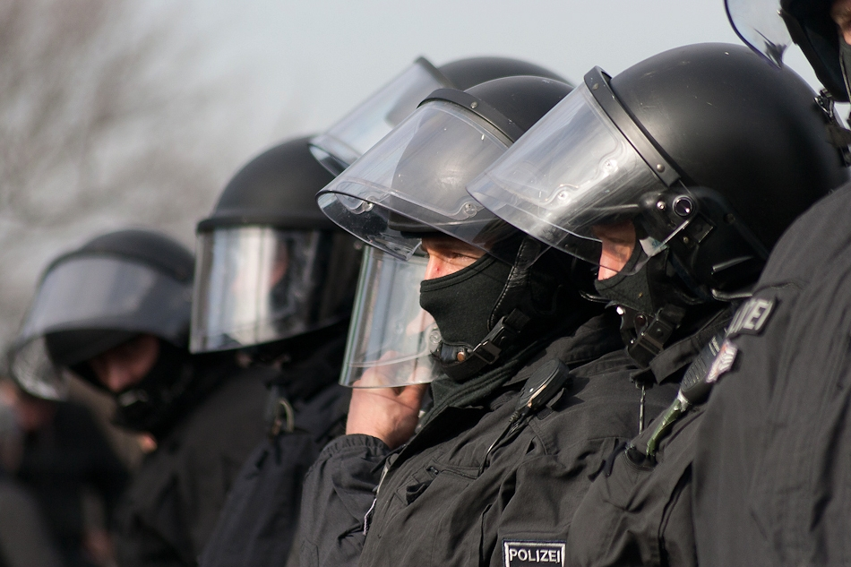 Dresden Nazifrei 2012: Polizisten